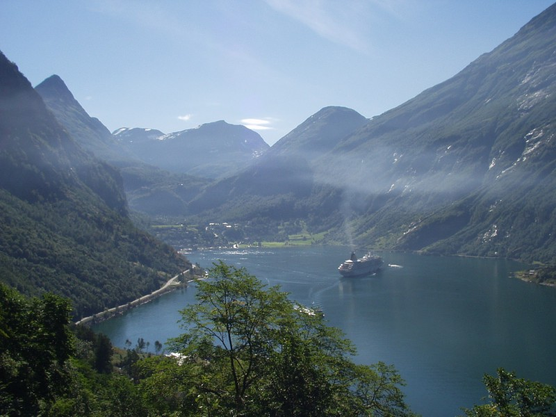 Description: Geiranger from Ørnesvingen Capture date: 2005-08-21 Photographer: sgm